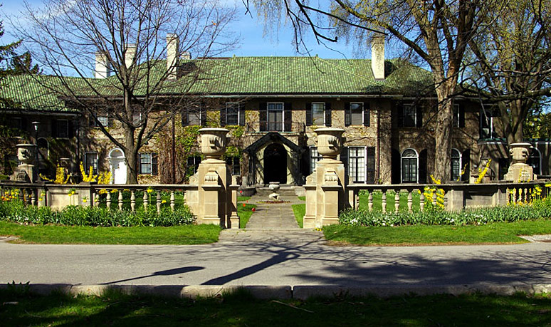 Glendon Campus